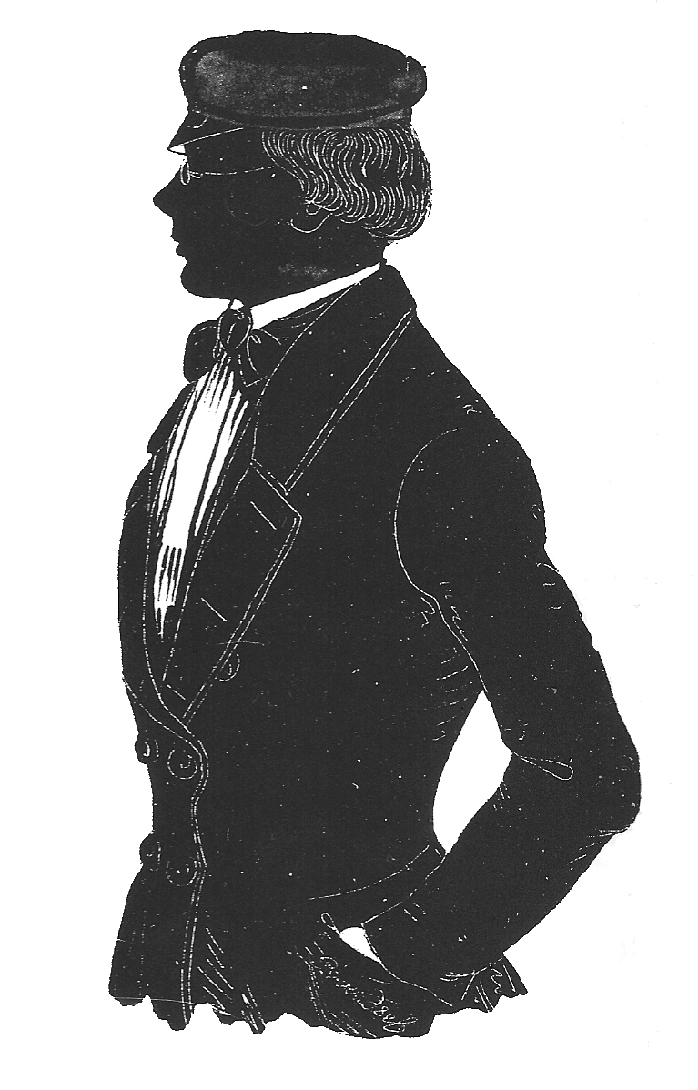 Unbekannter Student (Silhouette, Tuschezeichnung, 80 x 73 mm)